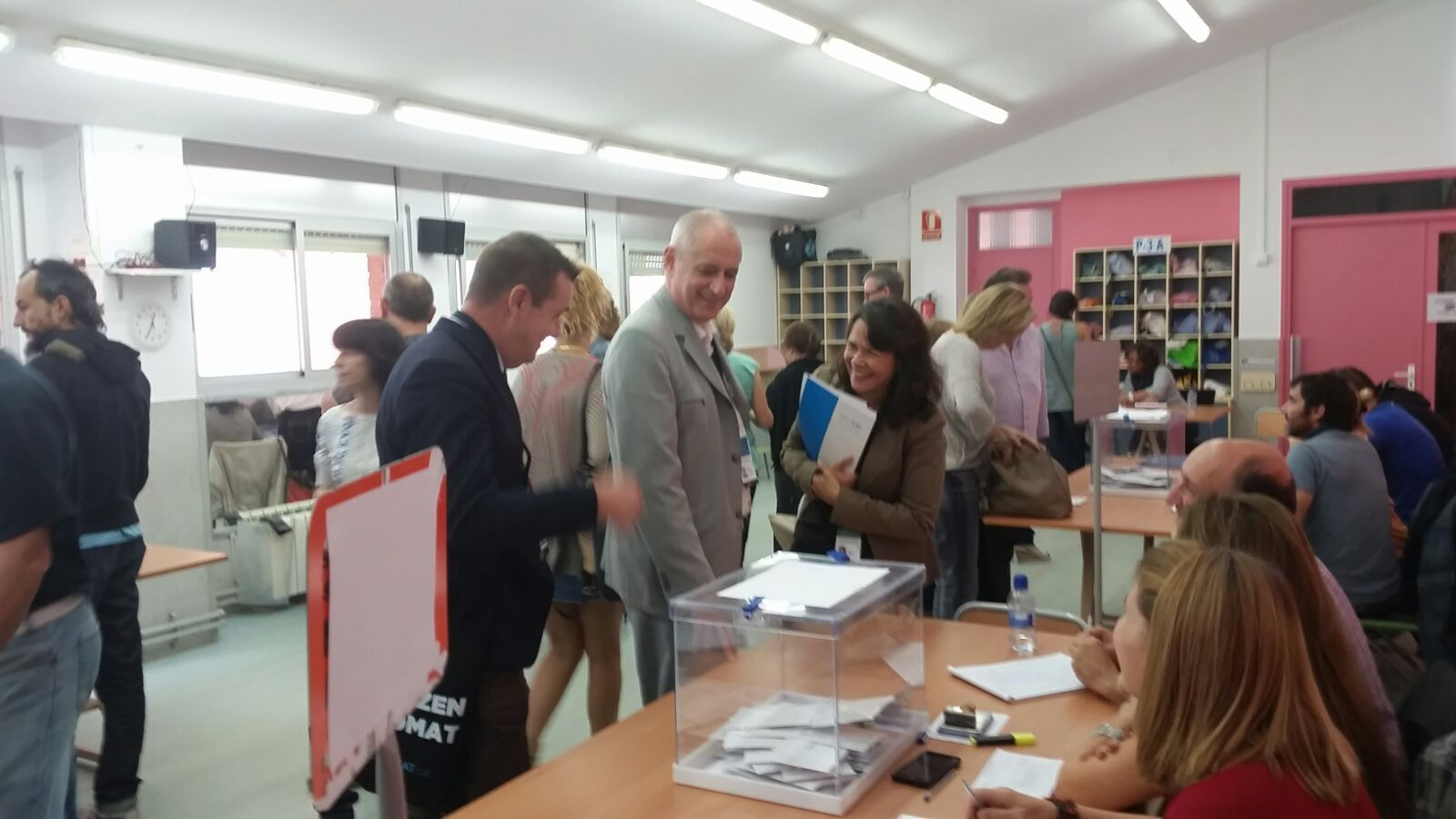 Gérard Onesta com a membre dels observadors de la Comunitat Europea a les eleccions al Parlament de Catalunya de 27-9-2015. Visita al col·legi electoral de l'Ametlla del Vallès